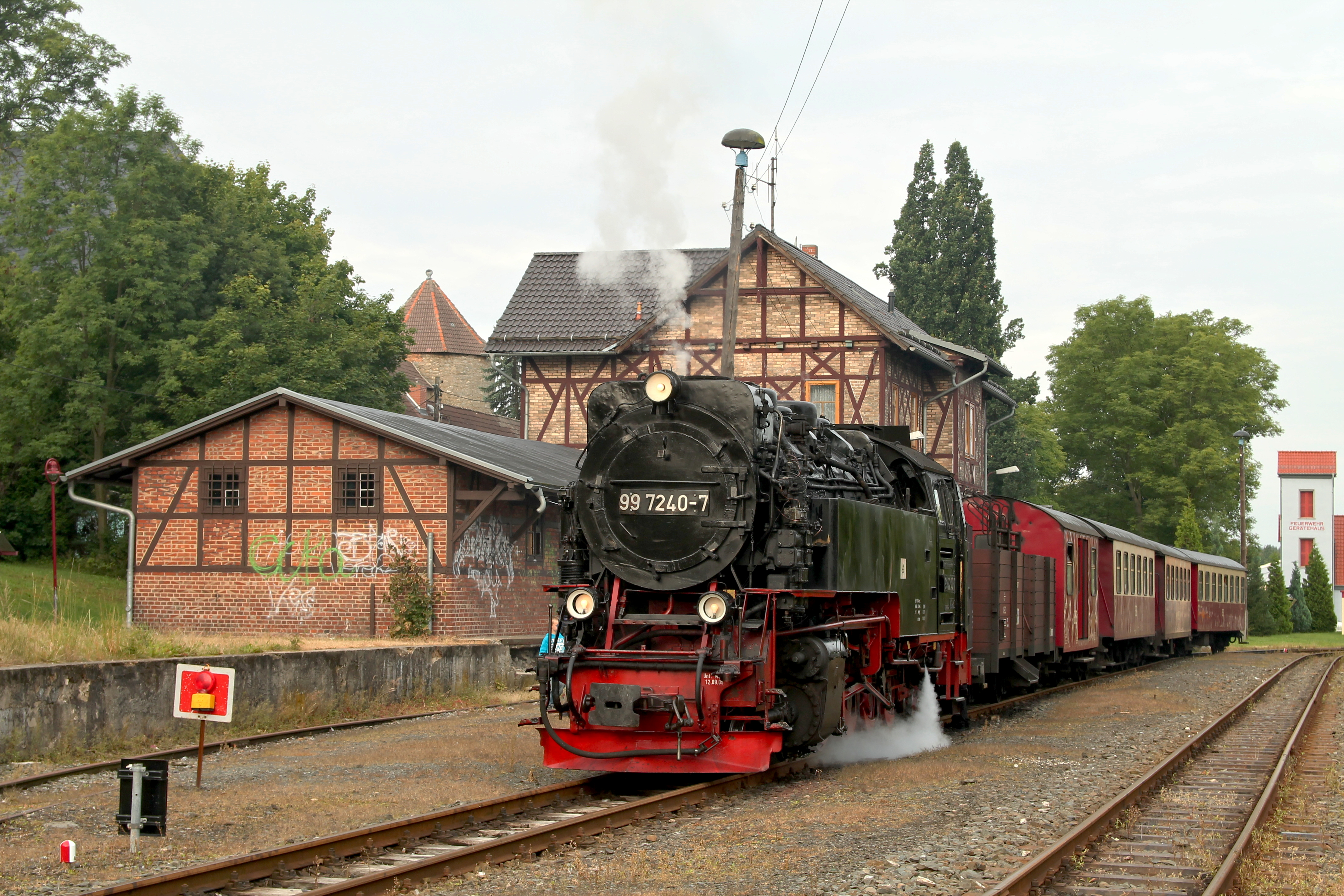 Bahnhof Harzgerode der HSB mit Dampflokomotive 99 7240 am 17. August 2012